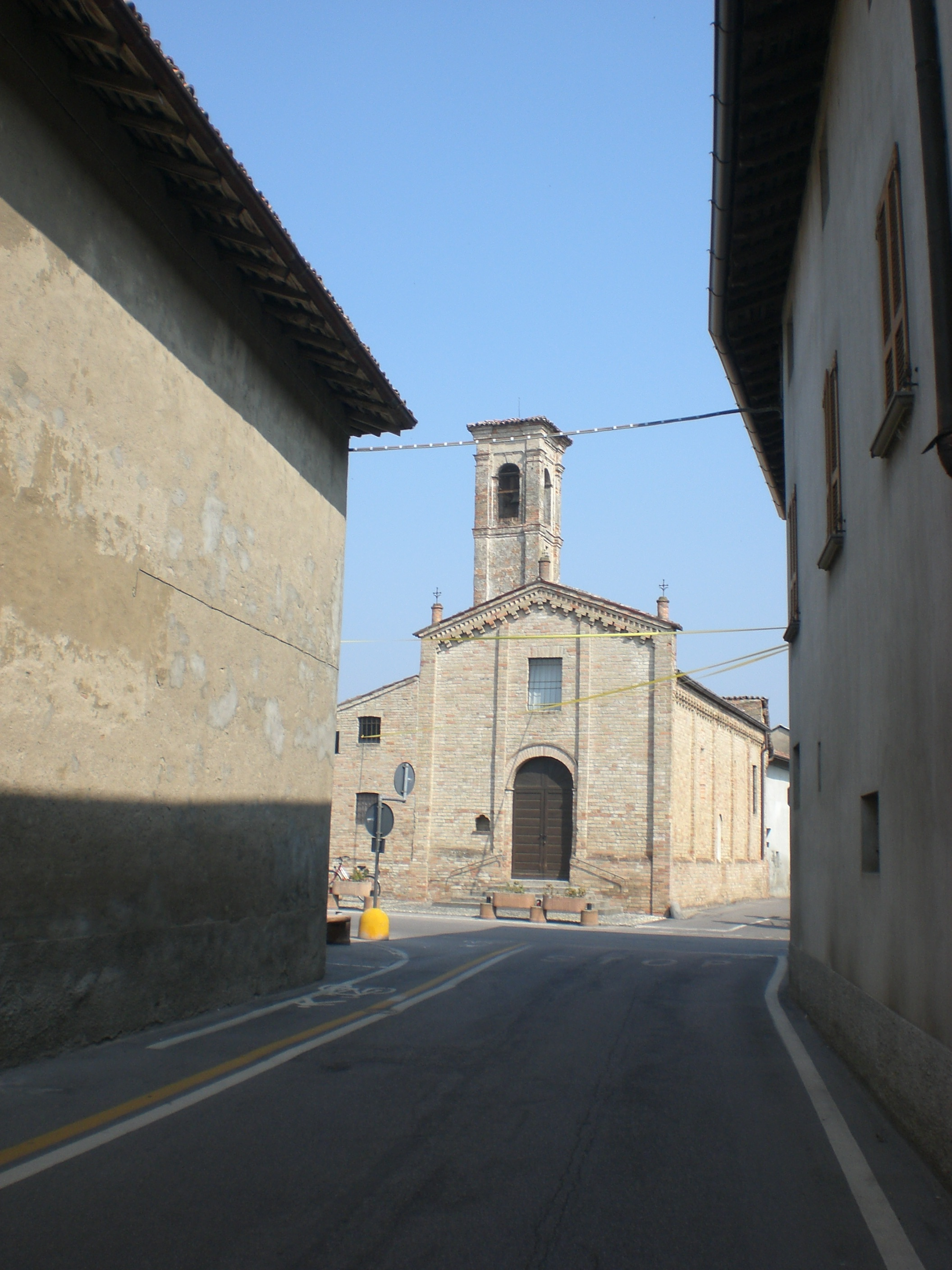 Brisckerly - Opera sua - Izano